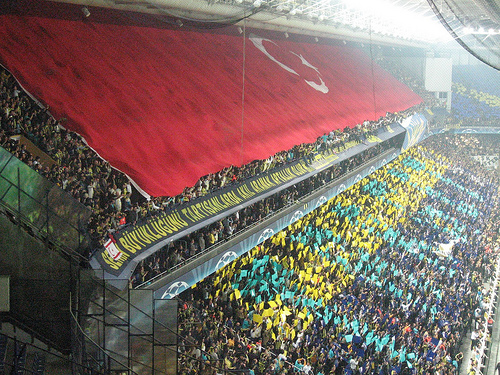 Fenerbahçe-Chelsea Stad Manzaraları